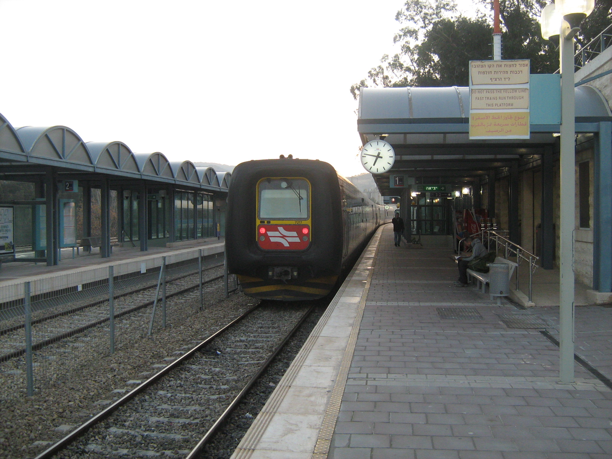 תחנת הרכבת בבית שמש